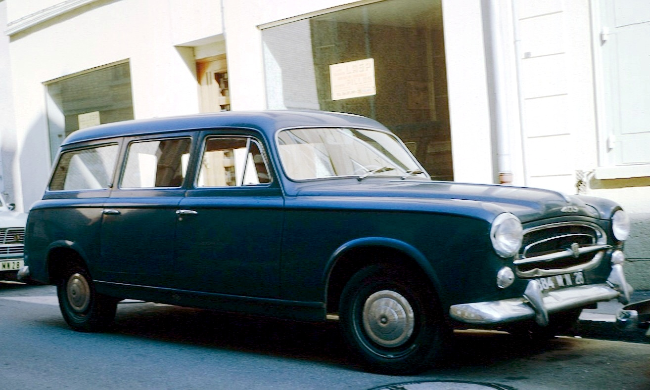 Peugeot 403 Break en France (Chartres?)